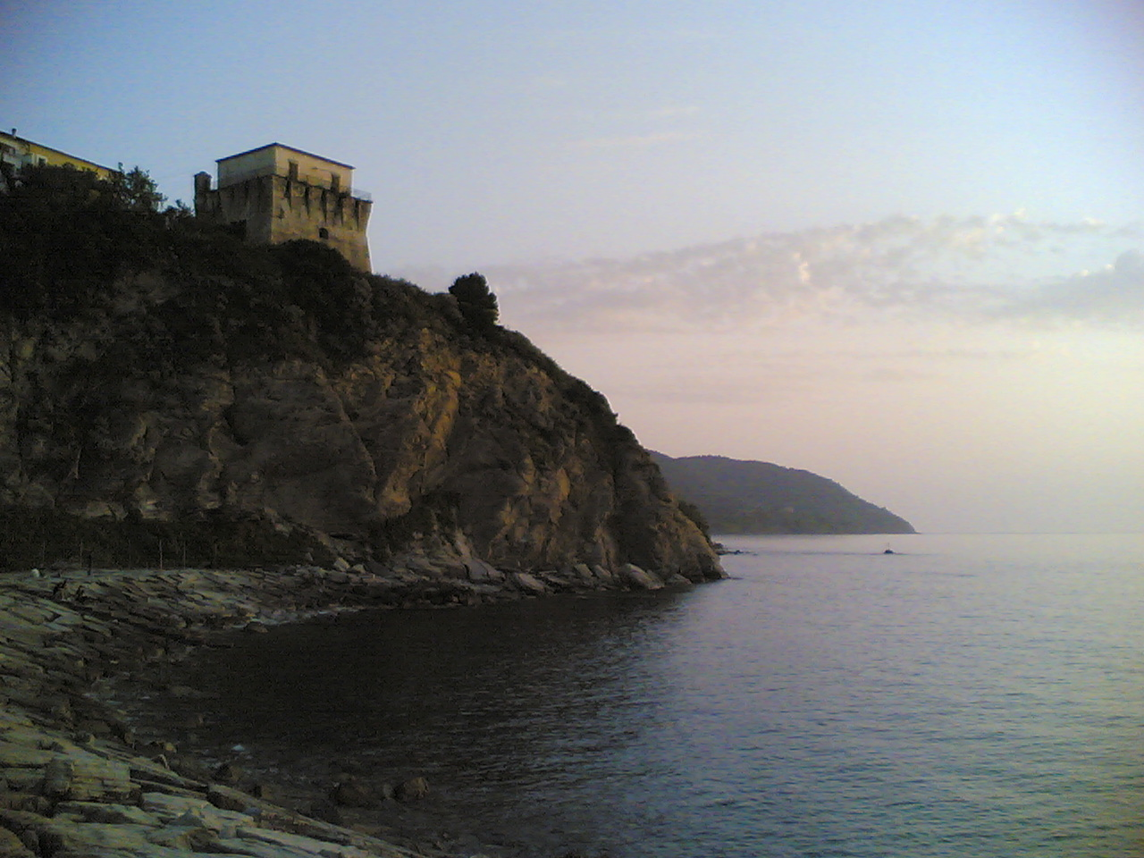 Carlo Iannuzzi, Opera Propria, Agropoli - Torre S. Francesco, GFDL e Creative Commons CC-BY-SA tutte le versioni (3.0, 2.5, 2.0 e 1.0), sono l'autore